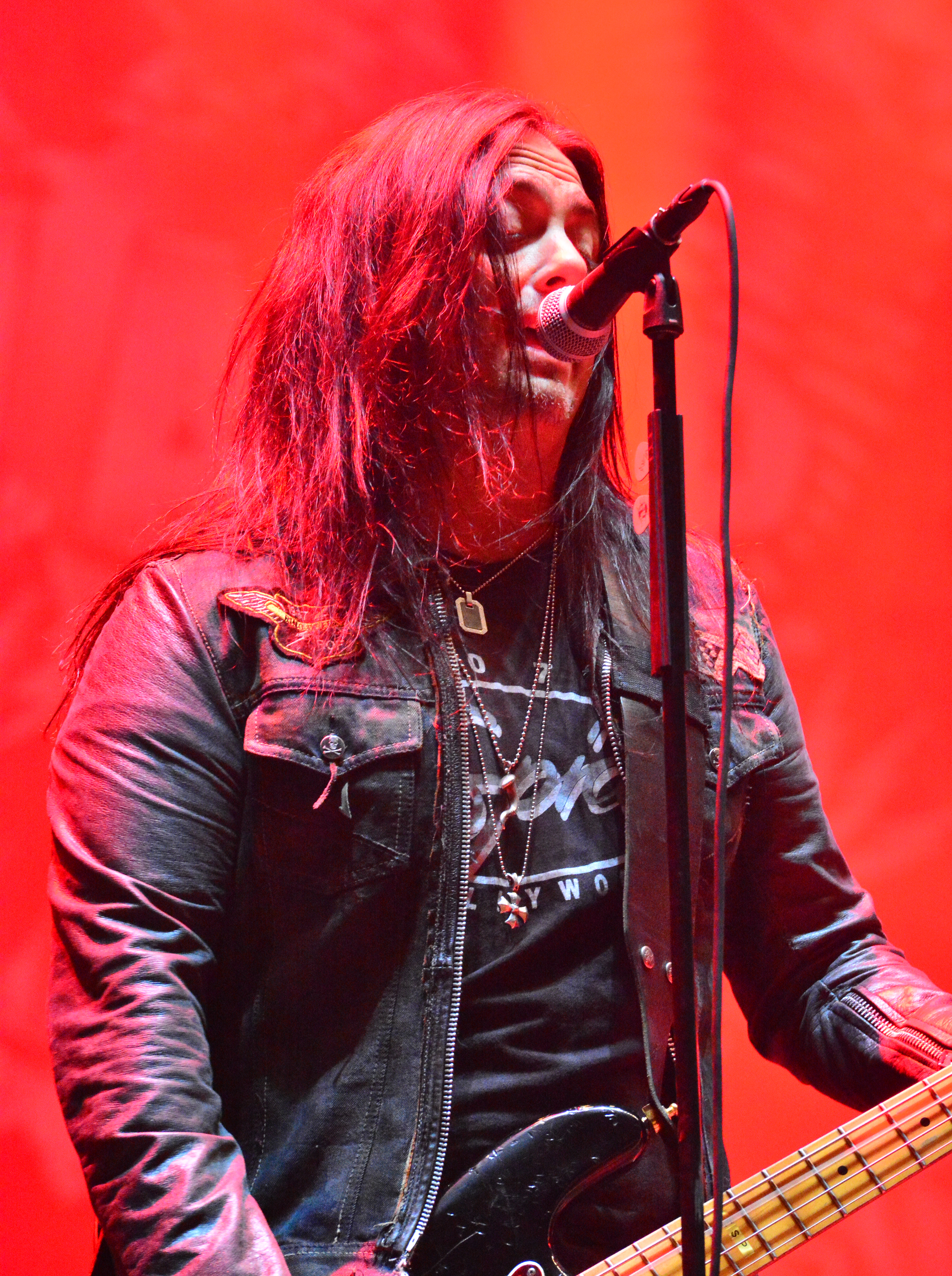 W.A.S.P. beim Wacken Open Air 2014